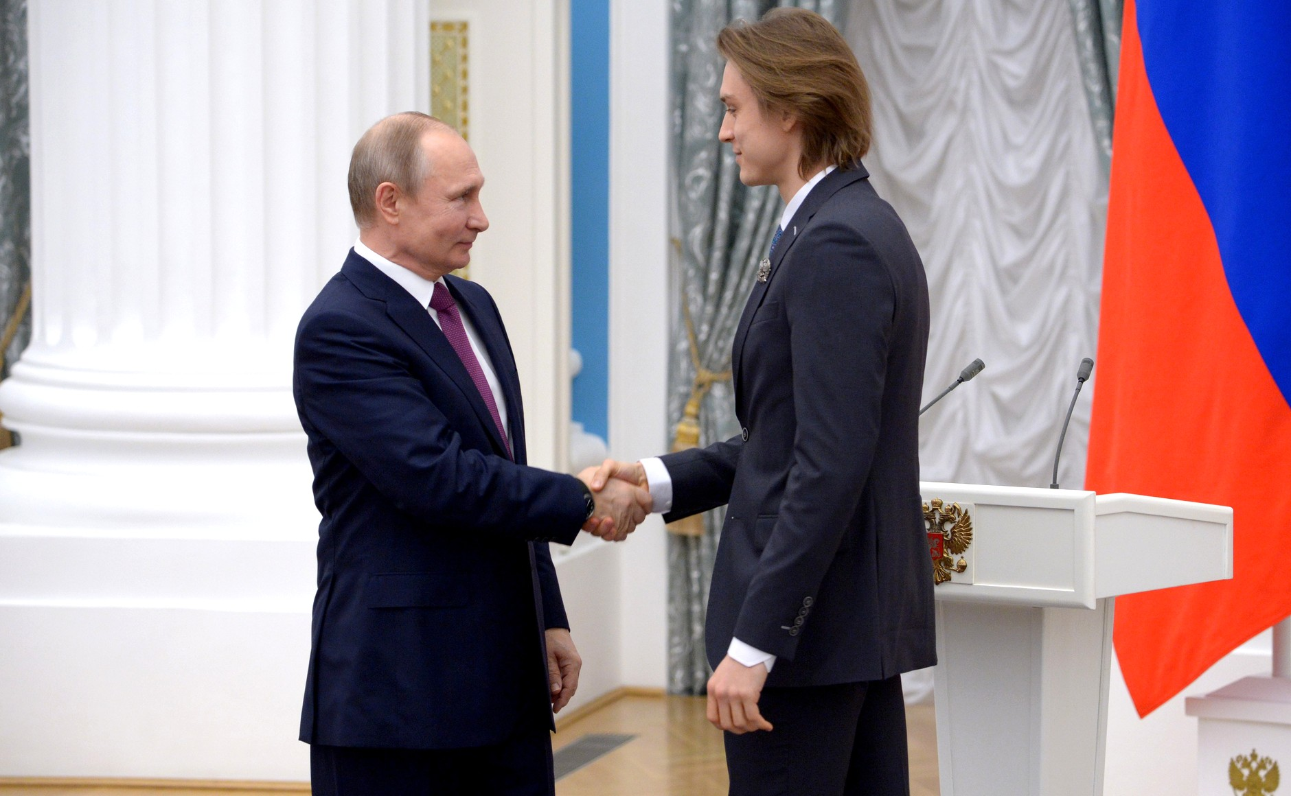 Премии Президента России для молодых деятелей культуры удостоен солист Большого театра Денис Родькин.